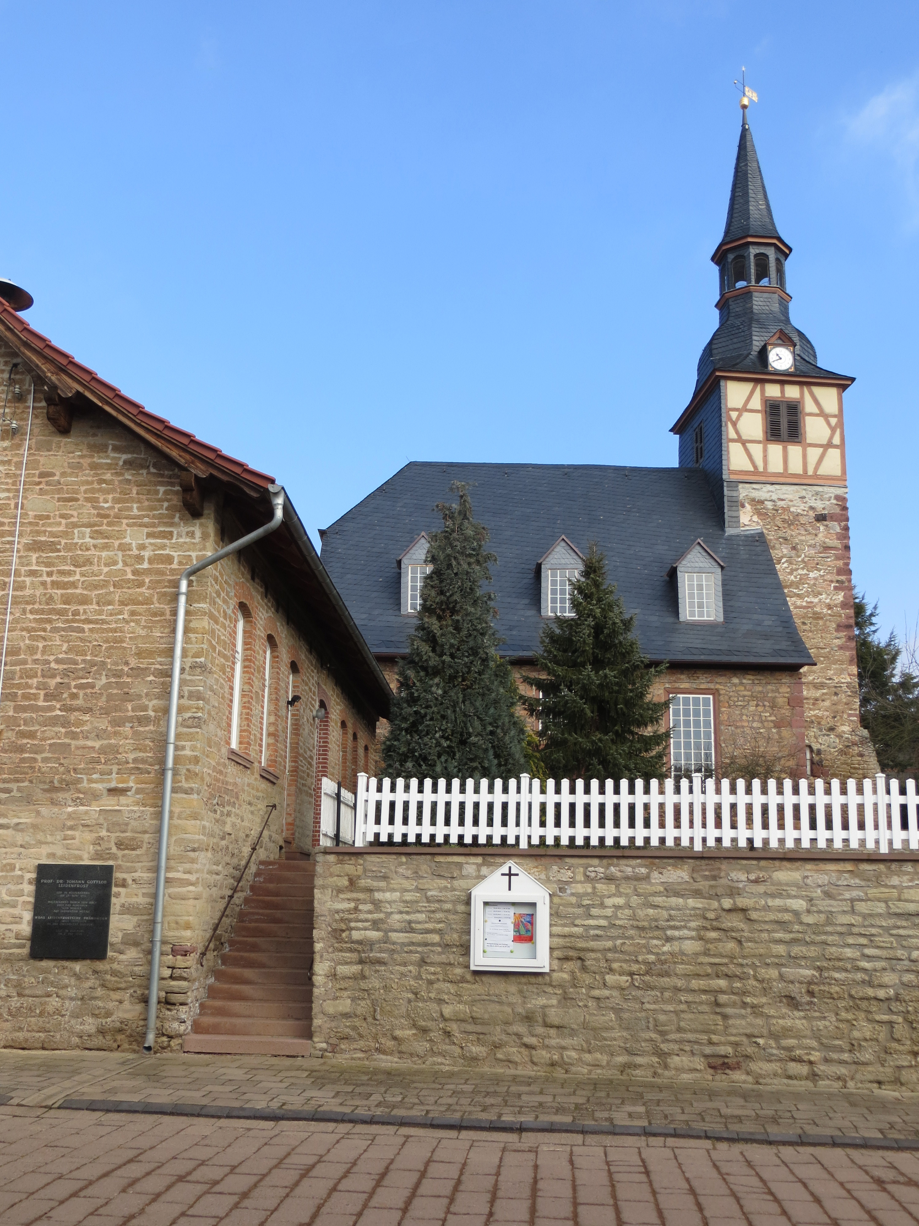 Rosperwenda, St. Margaretha Kirche, links an der alten Schule sieht man die Gedenktafel für Johann Gottlob Leidenfrost.This is a photograph of an architectural monument. 84247This is a photograph of an architectural monument. 84248